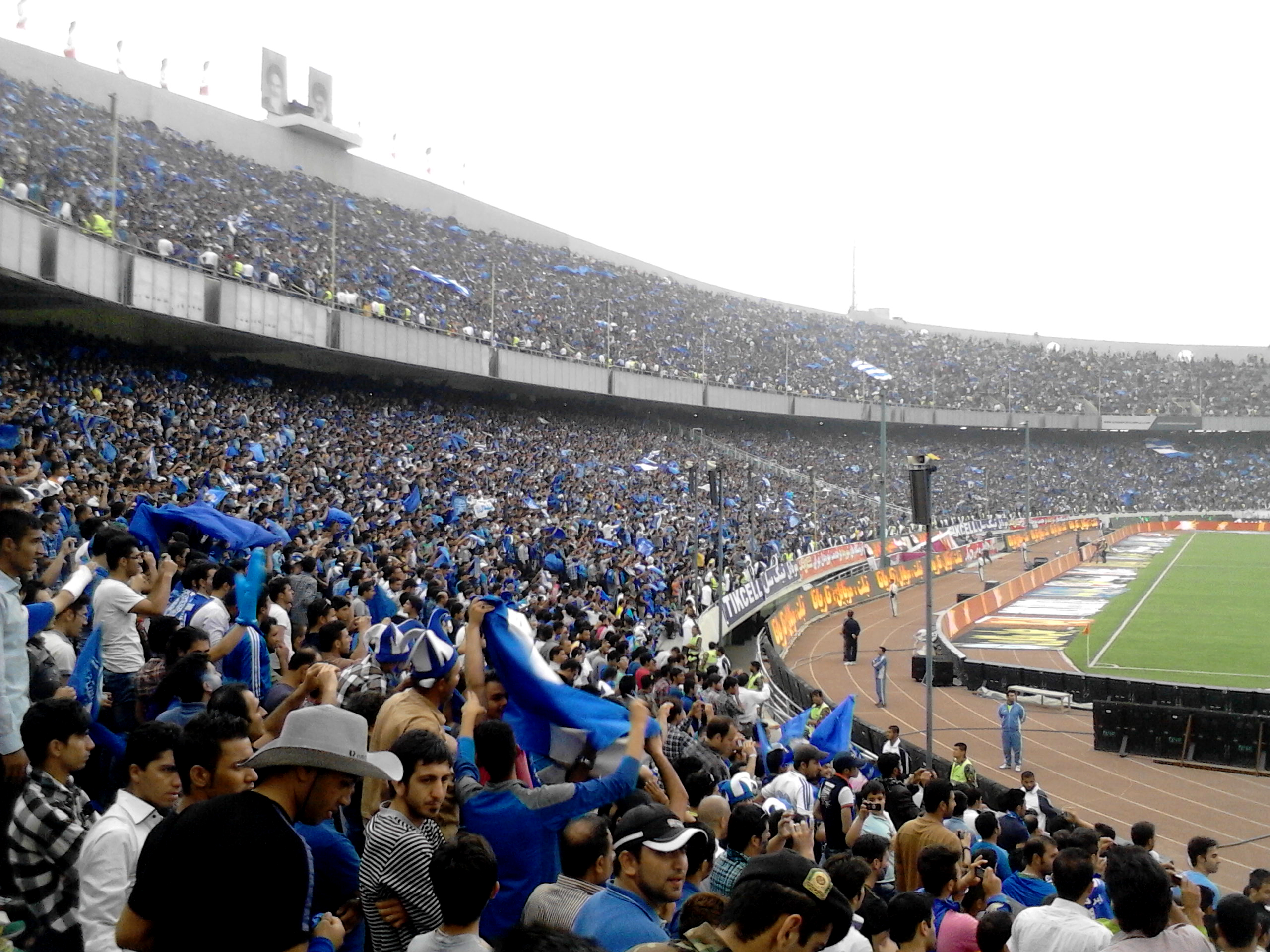 نمایی از هواداران استقلال در ورزشگاه آزادی